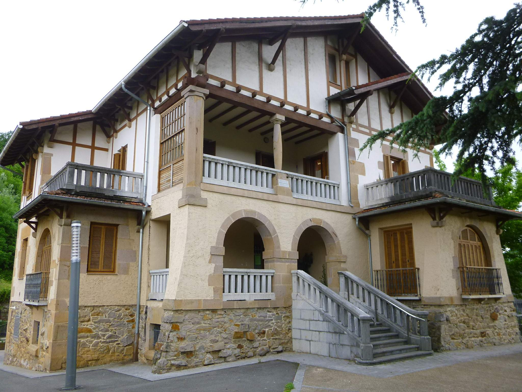 Idiazábal (Guipúzcoa)